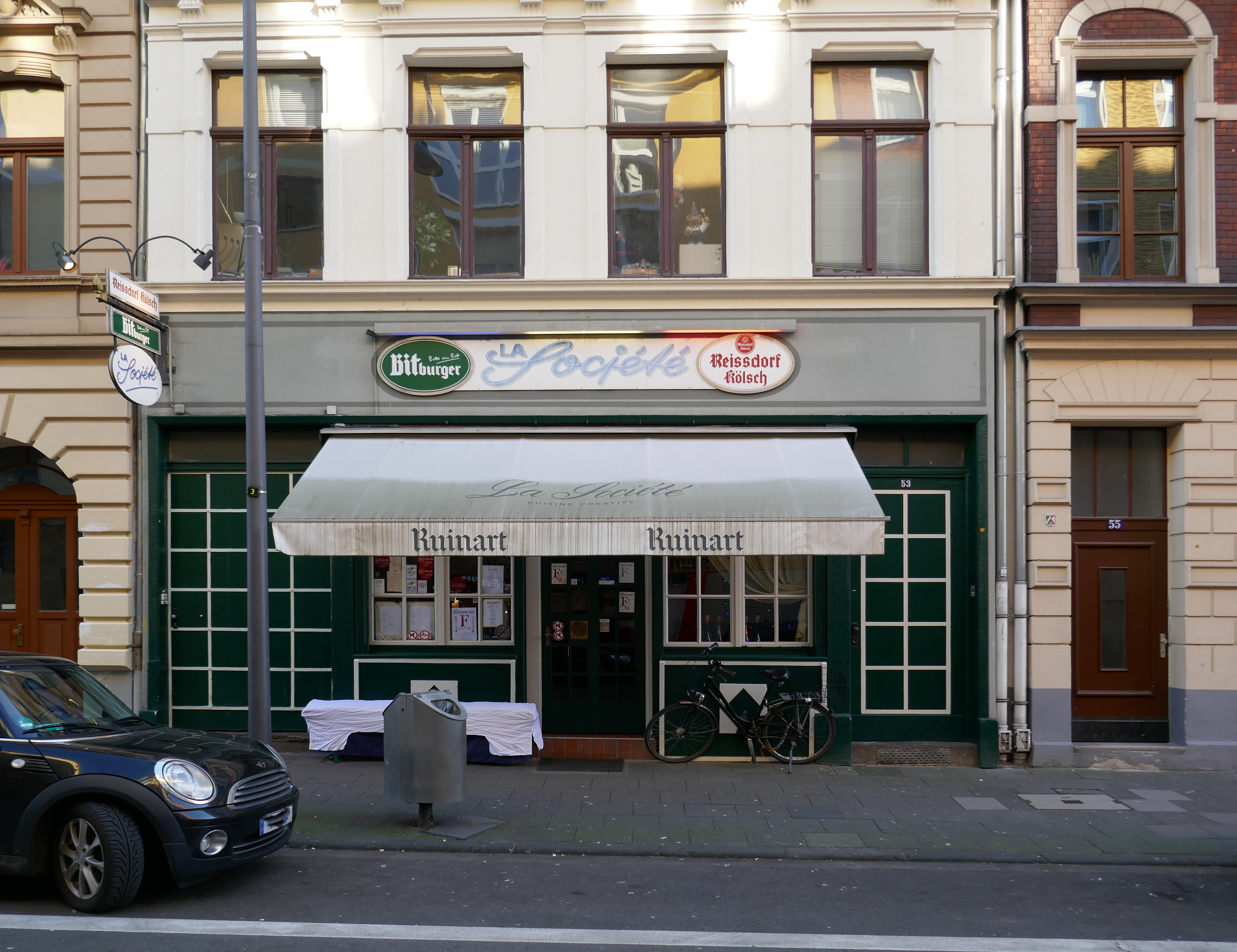 Wohn- und Geschäftshaus (Restaurant La Societe) Kyffhäuserstraße 53, Köln. This is a photograph of an architectural monument.